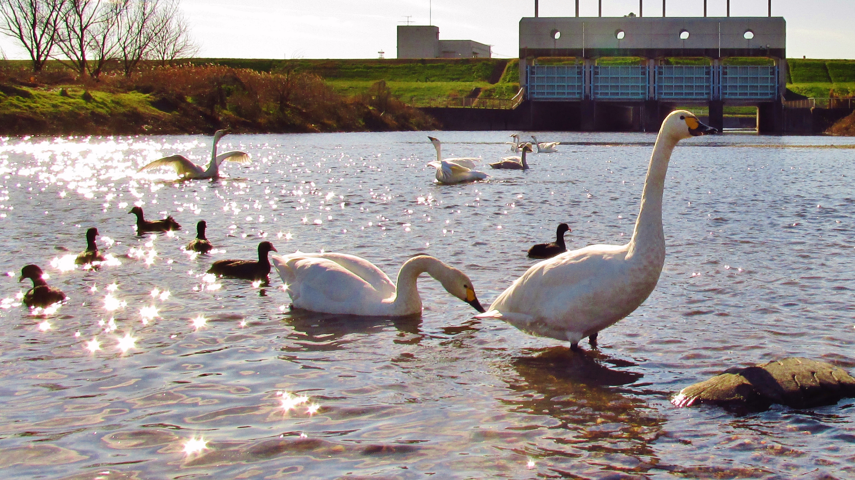 毎年１２月頃、埼玉県中西部を流れる越辺川（川島町）の浅瀬に群れをなして飛来する。